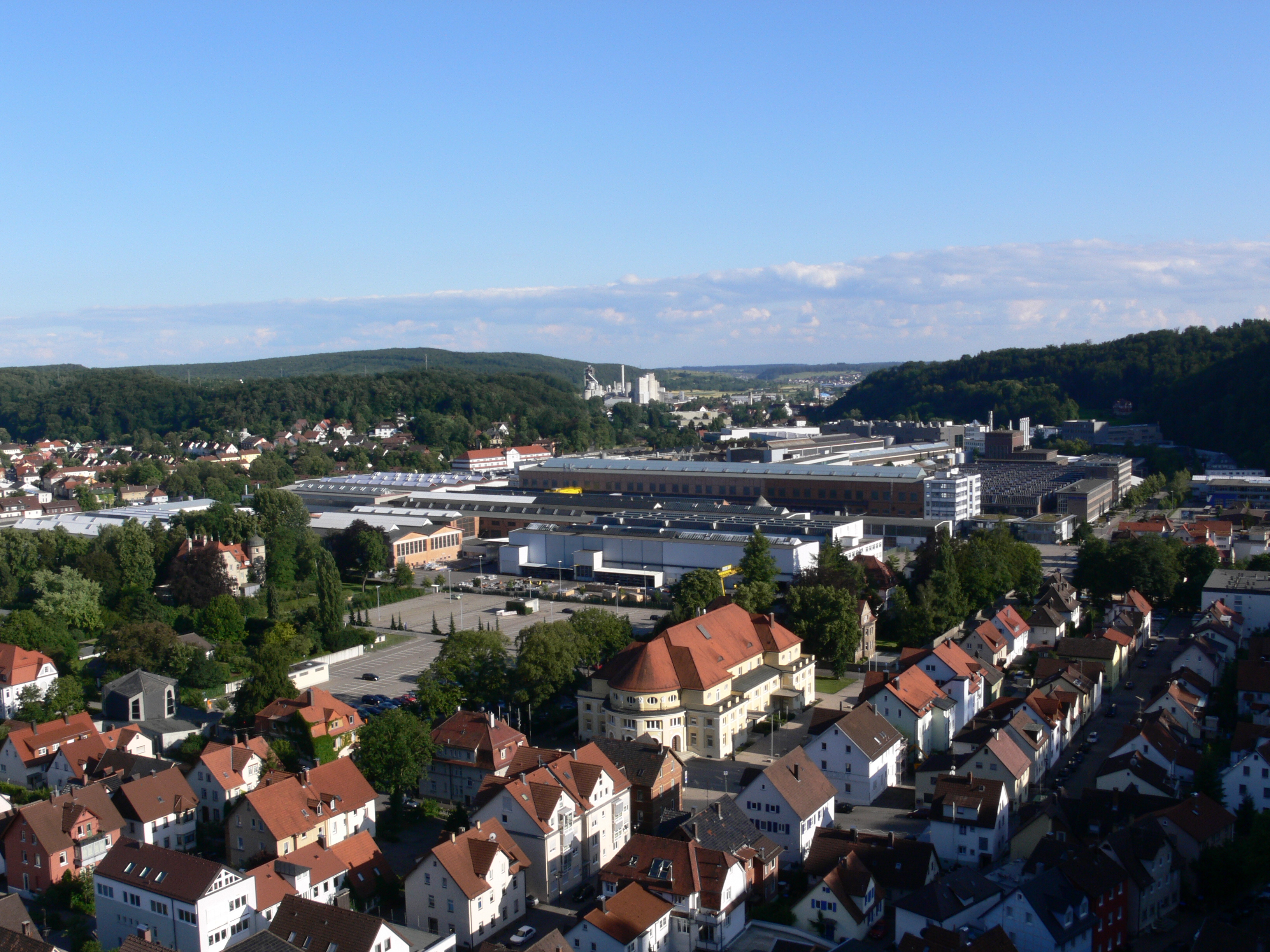 Heidenheim an der Brenz, Blick von Schloss Hellenstein